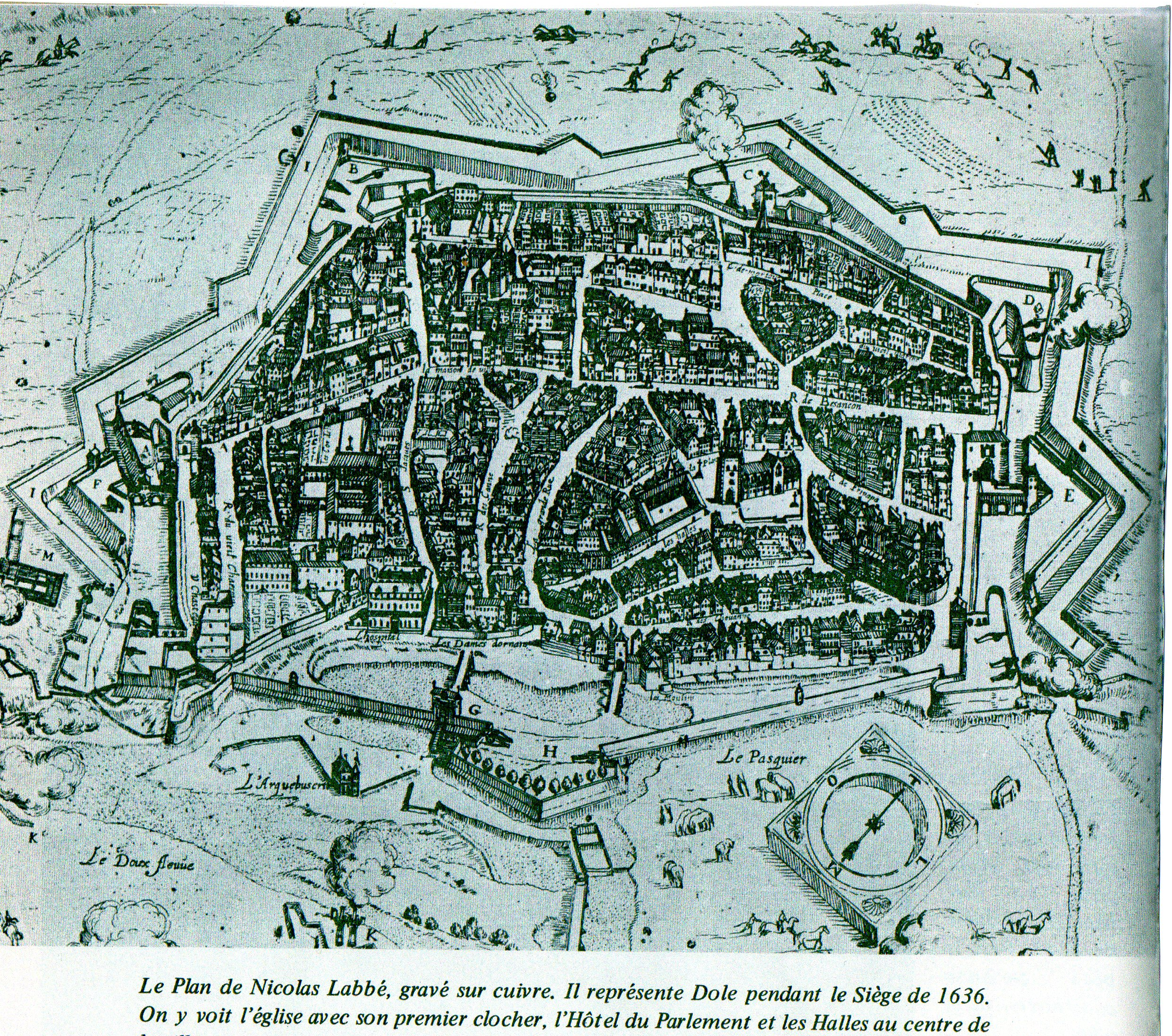 Ville de Dole entourée de remparts au XVIIe siècle